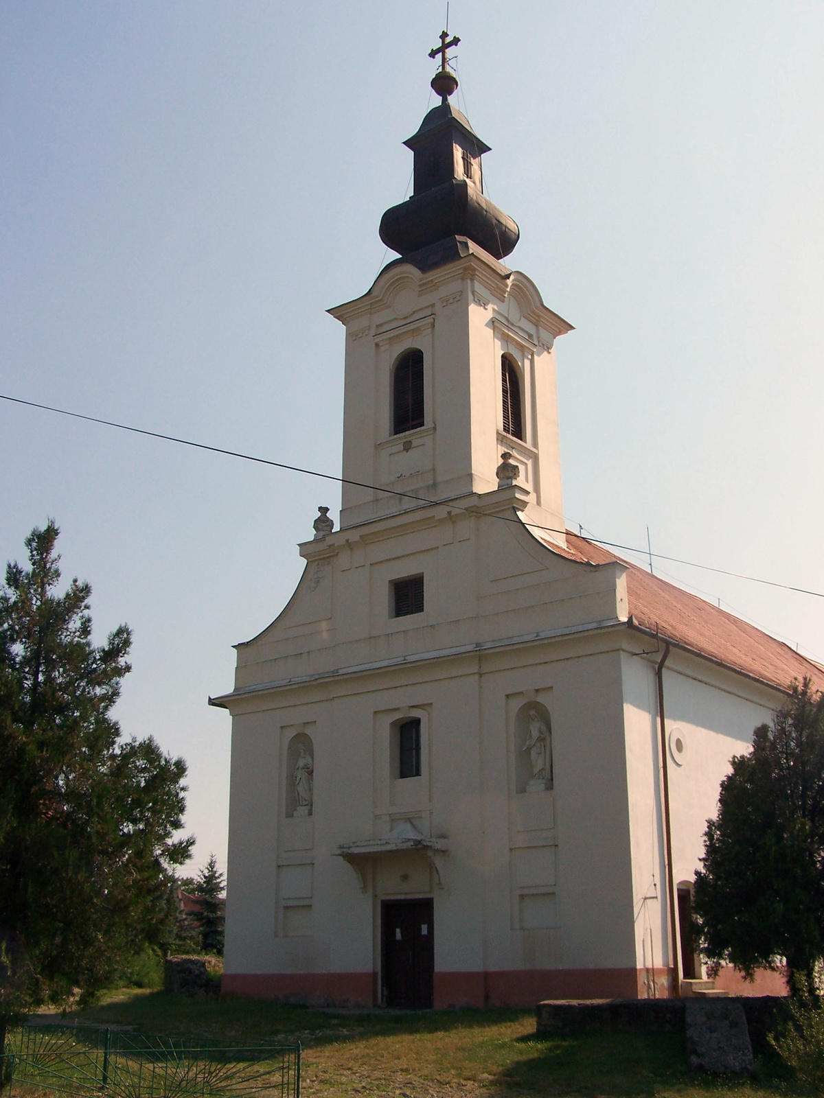 Római katolikus templom (Szent György) (Jobbágyi, Felszabadulás út 60.)